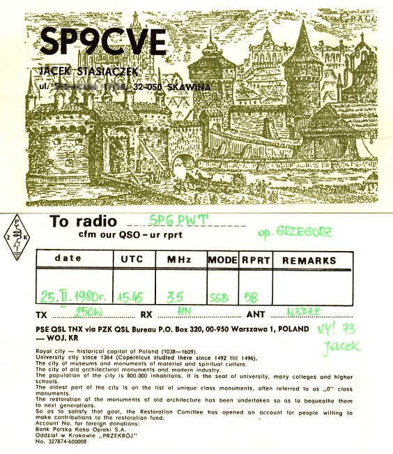 Polish QSL card